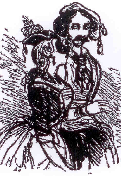 Un jeune couple de Parisiens en Carnaval à Paris en 1842.